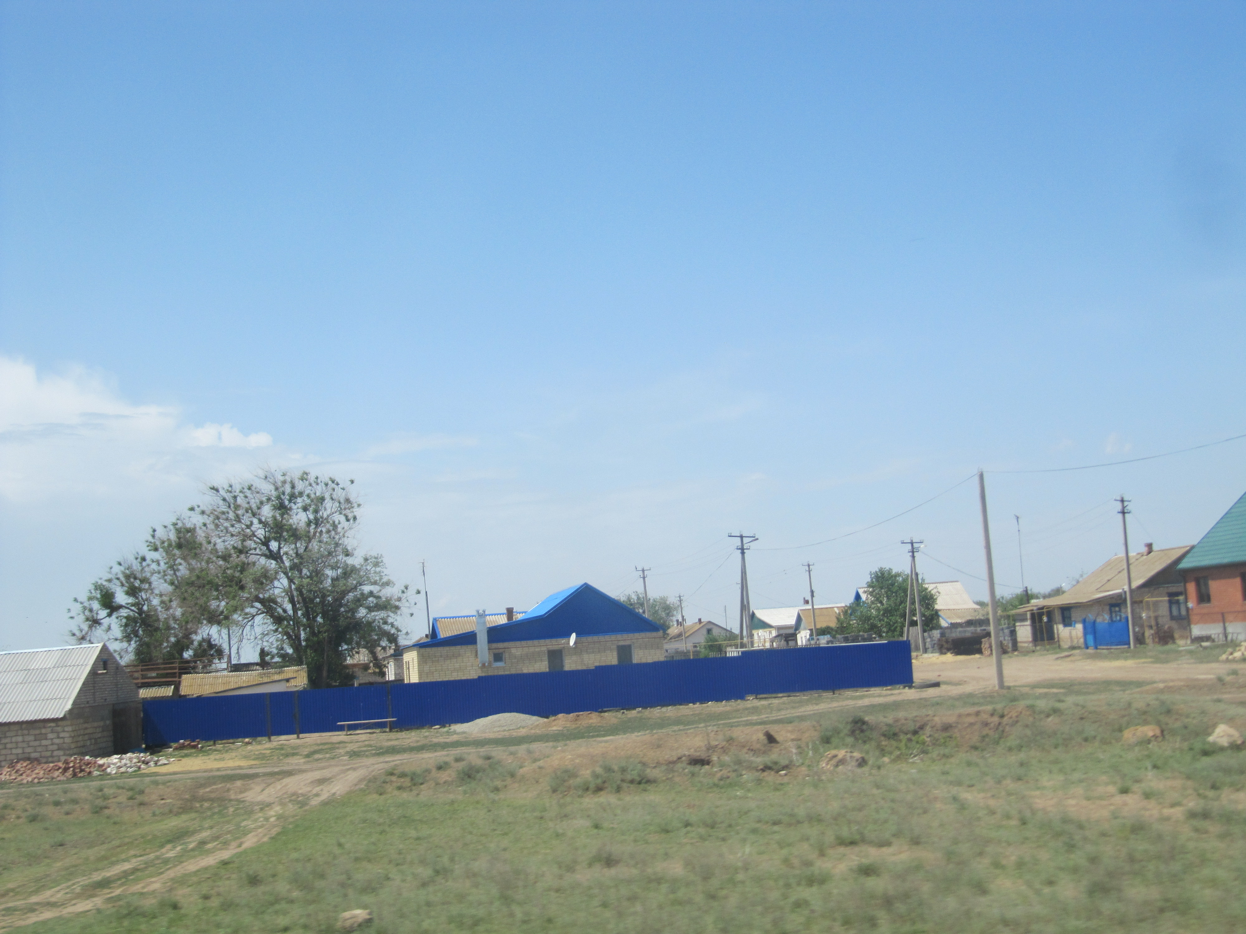 Ергенинский, Калмыкия